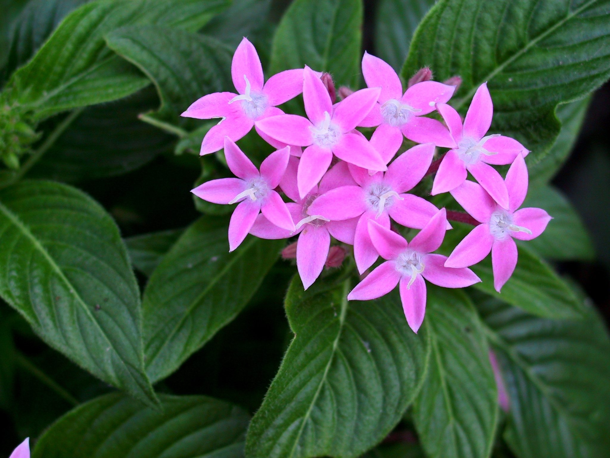 Pentas lanceolata